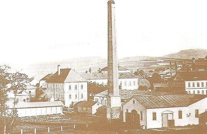 Fotografie Frölichovy továrny ve Varnsdorfu z roku 1850, 11 let po objevu fotografie